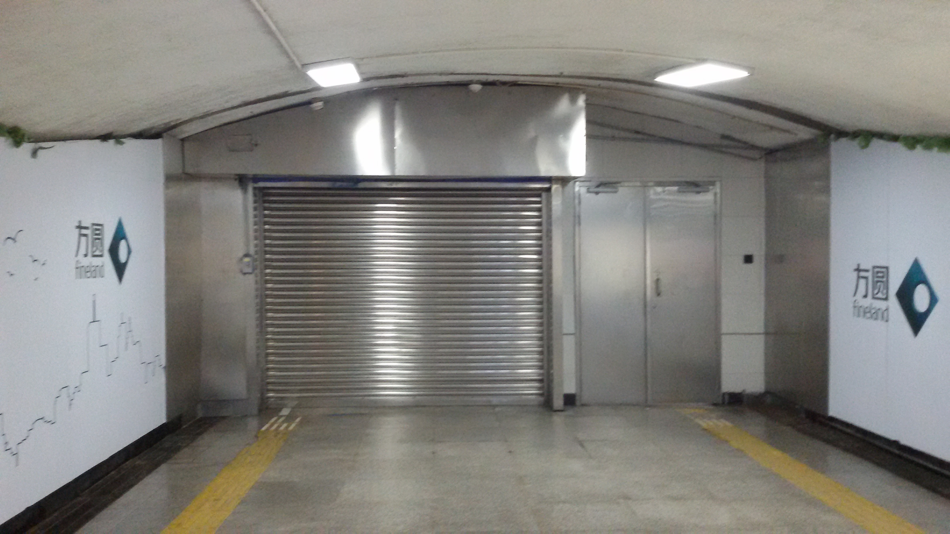 粵語: 之前東山口站嘅A出入口所在位。喺廣州地鐵6號綫開通之前，呢個出入口同B、C、D呢3個出入口相通。喺廣州地鐵6號綫開通之後，原先出入口通道變成轉車通道，個口已經攞嚟喺緊急情況下先至用得。